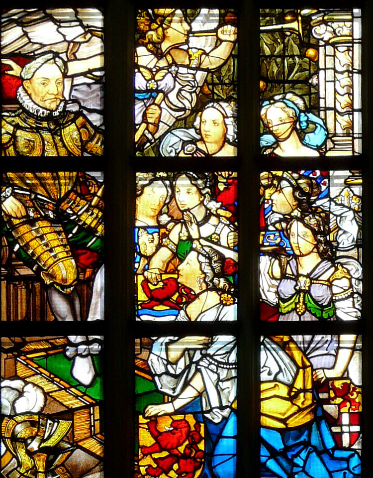 Kroningsraam (1898) van Otto Mengelberg - detail allegorie This file was derived from: P1020916Nieuwe Kerk Amsterdam.JPG